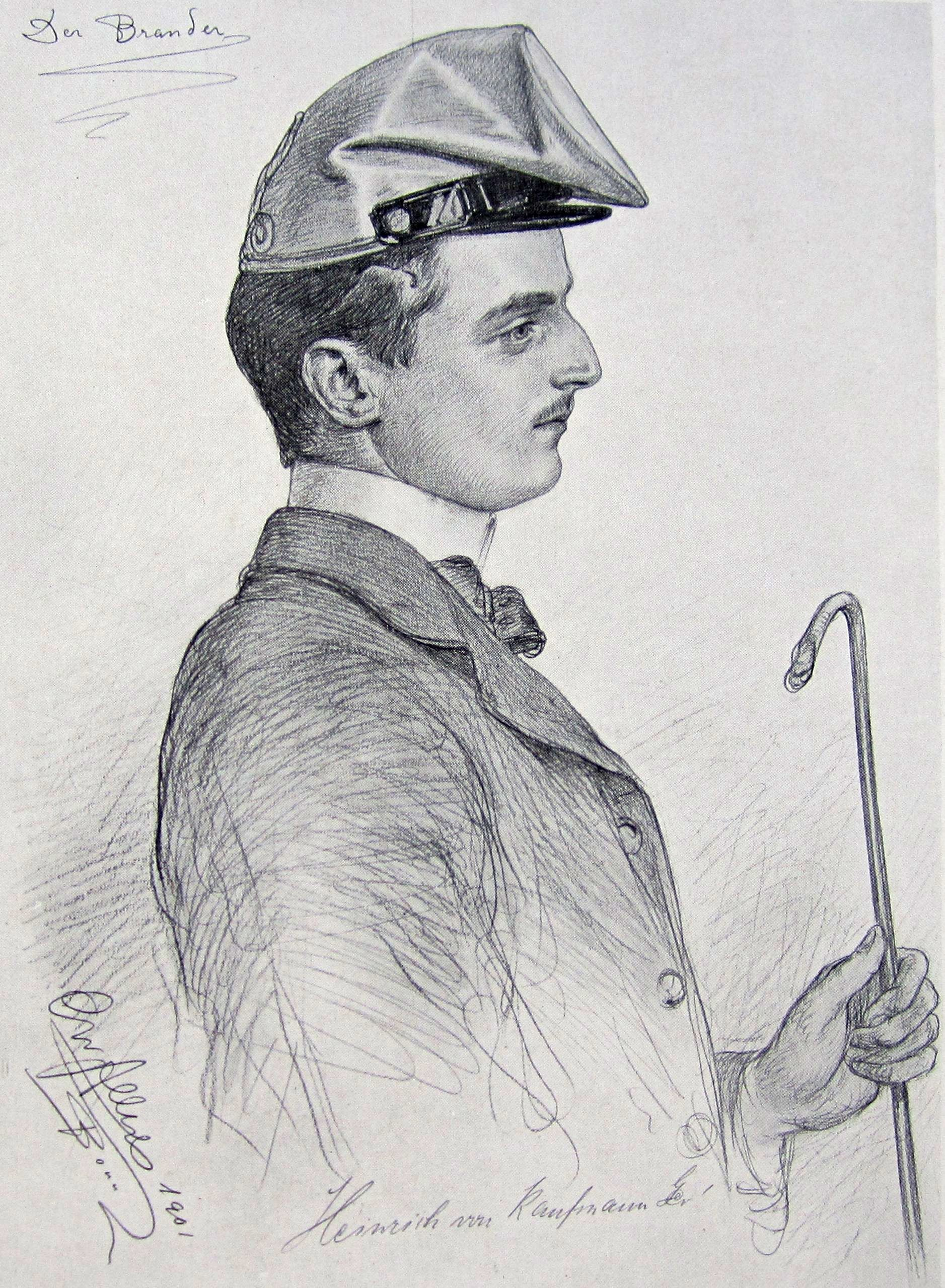 Seitenansicht des Heinrich von Kaufmann. Die angegebene Bezeichnung "Der Brander" ist im Sinne von Brandfuchs (= Fuchs im zweiten Semester) zu verstehen.